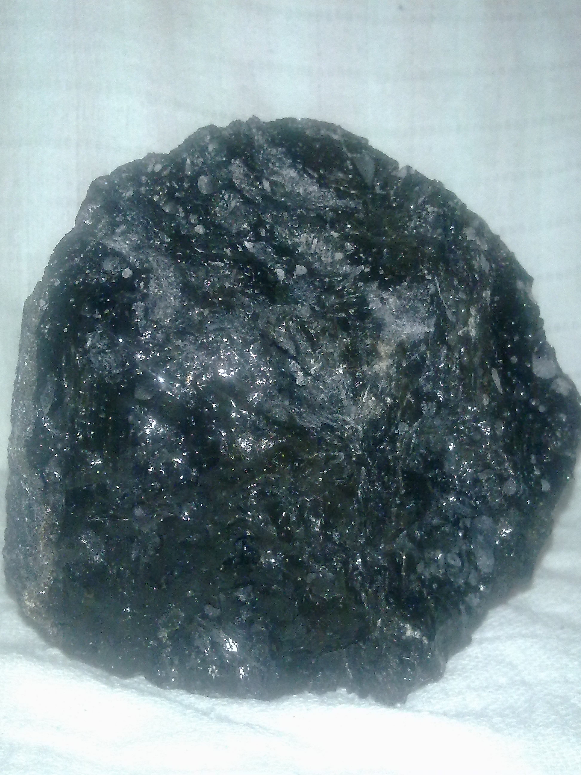 Indochinite